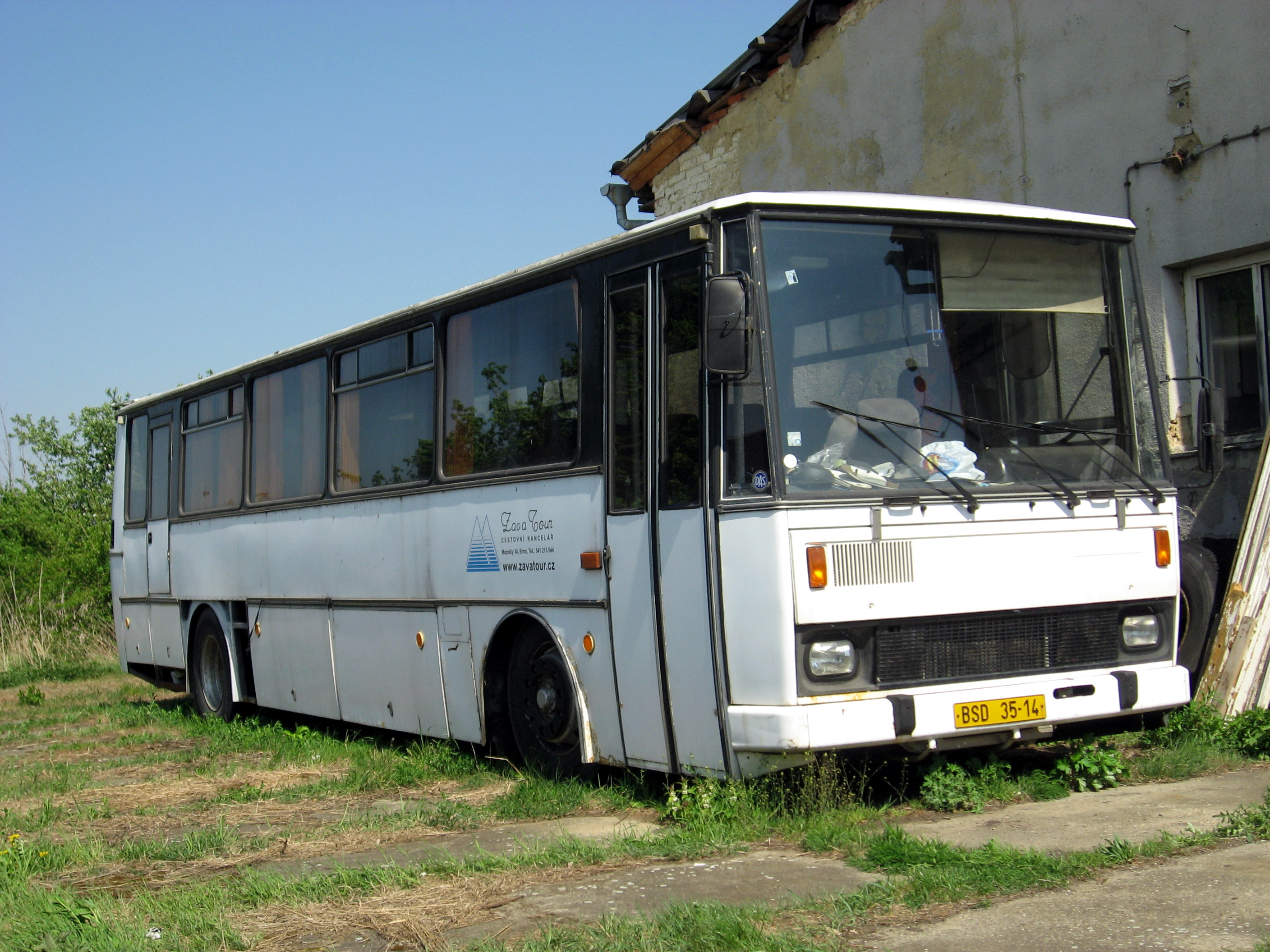 Karosa v Brně